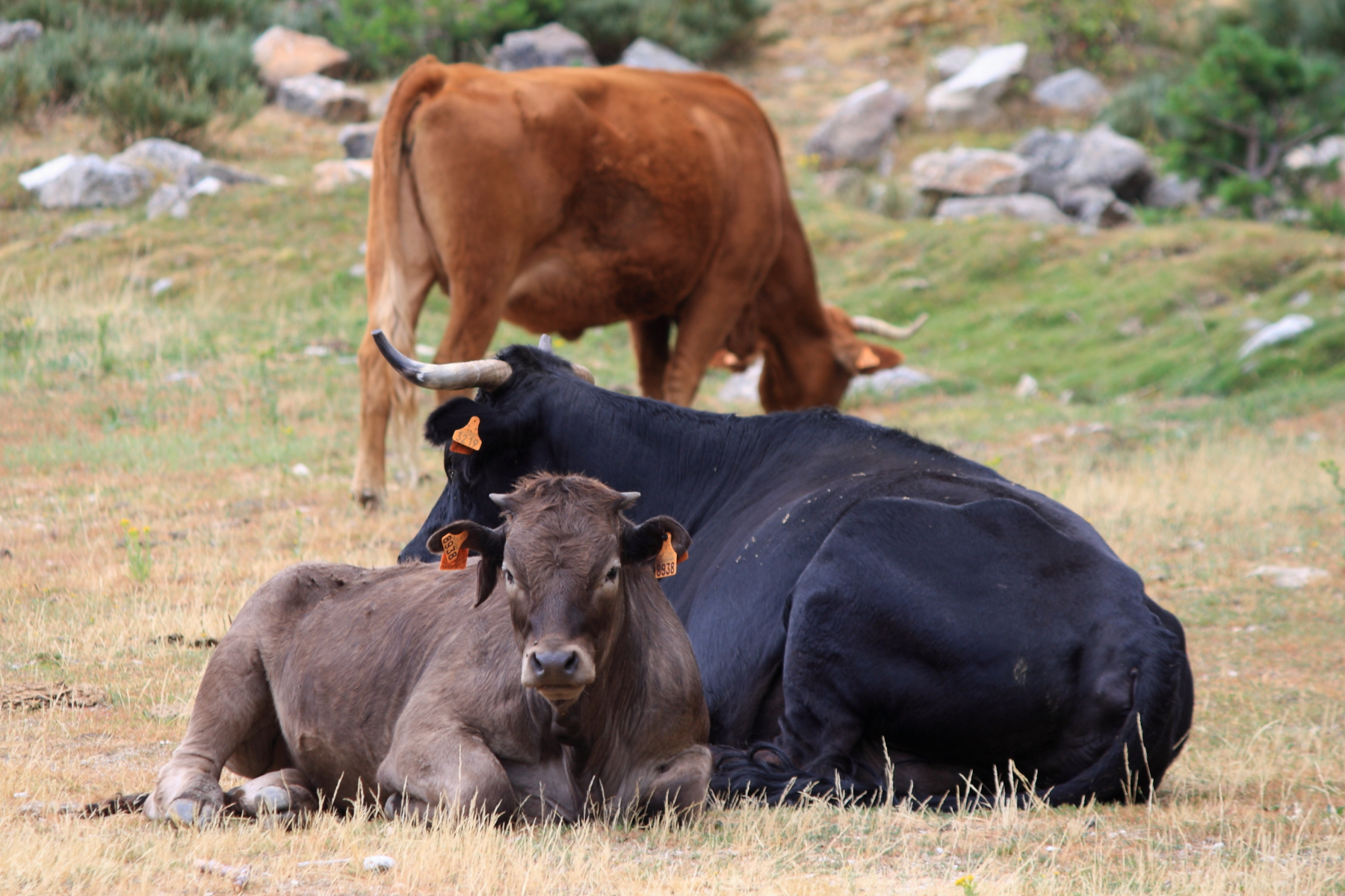 Vaca, Puerto de Cotos, Sierra de Guadarrama Entre las provincias de Madrid y Segovia.España